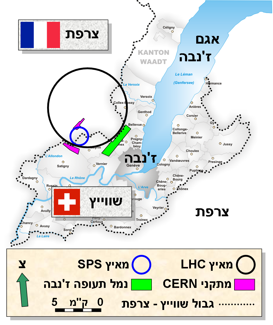 מפת CERN